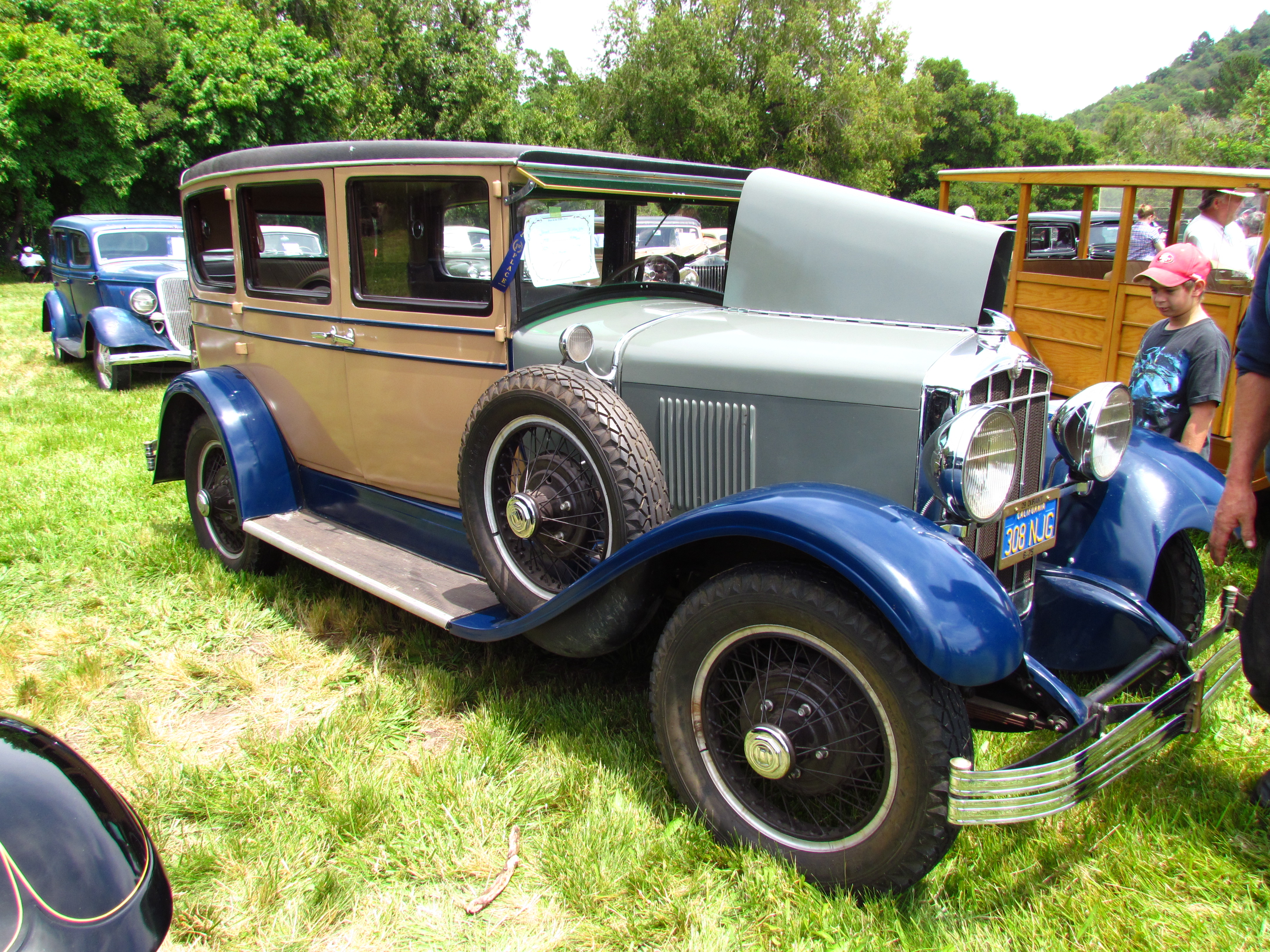 1929 Durant